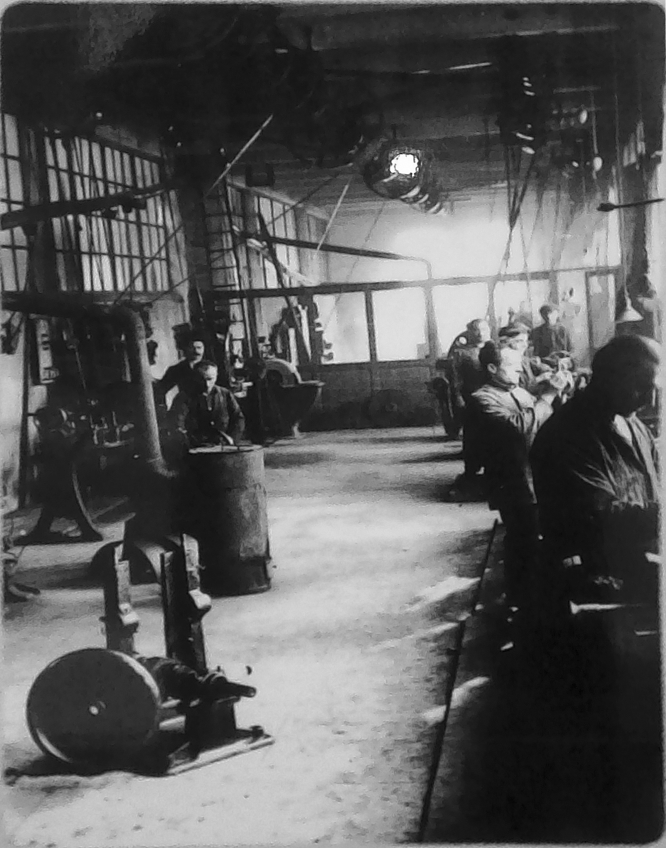 Operai al lavoro nella fabbrica dei chiodi di Hône: l'atelier nei primi anni della gestione Bersan. Foto del 1905 sul pannello turistico all'imbocco del ponte di Bard.